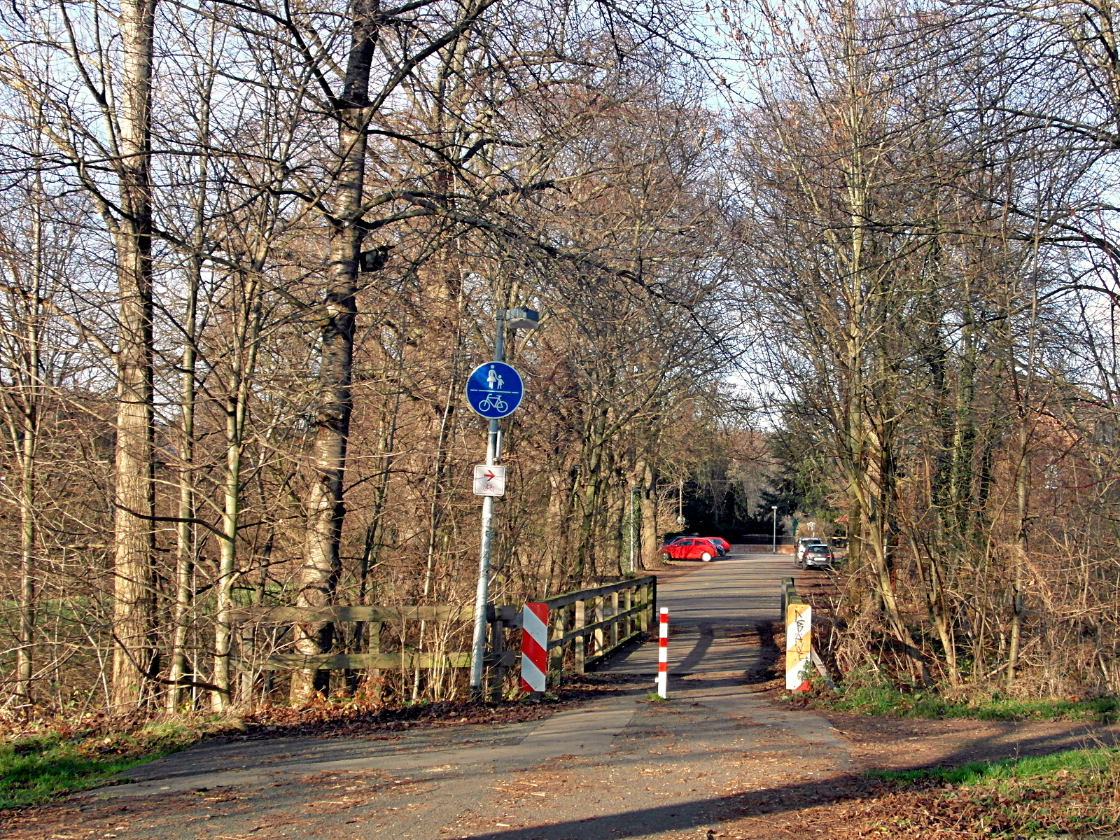 Brücke über die Ihme in Kückenmühle. Diese ersetzte in den 1980er Jahren die baufällig gewordene alte Brücke der früheren Kreisstraße.